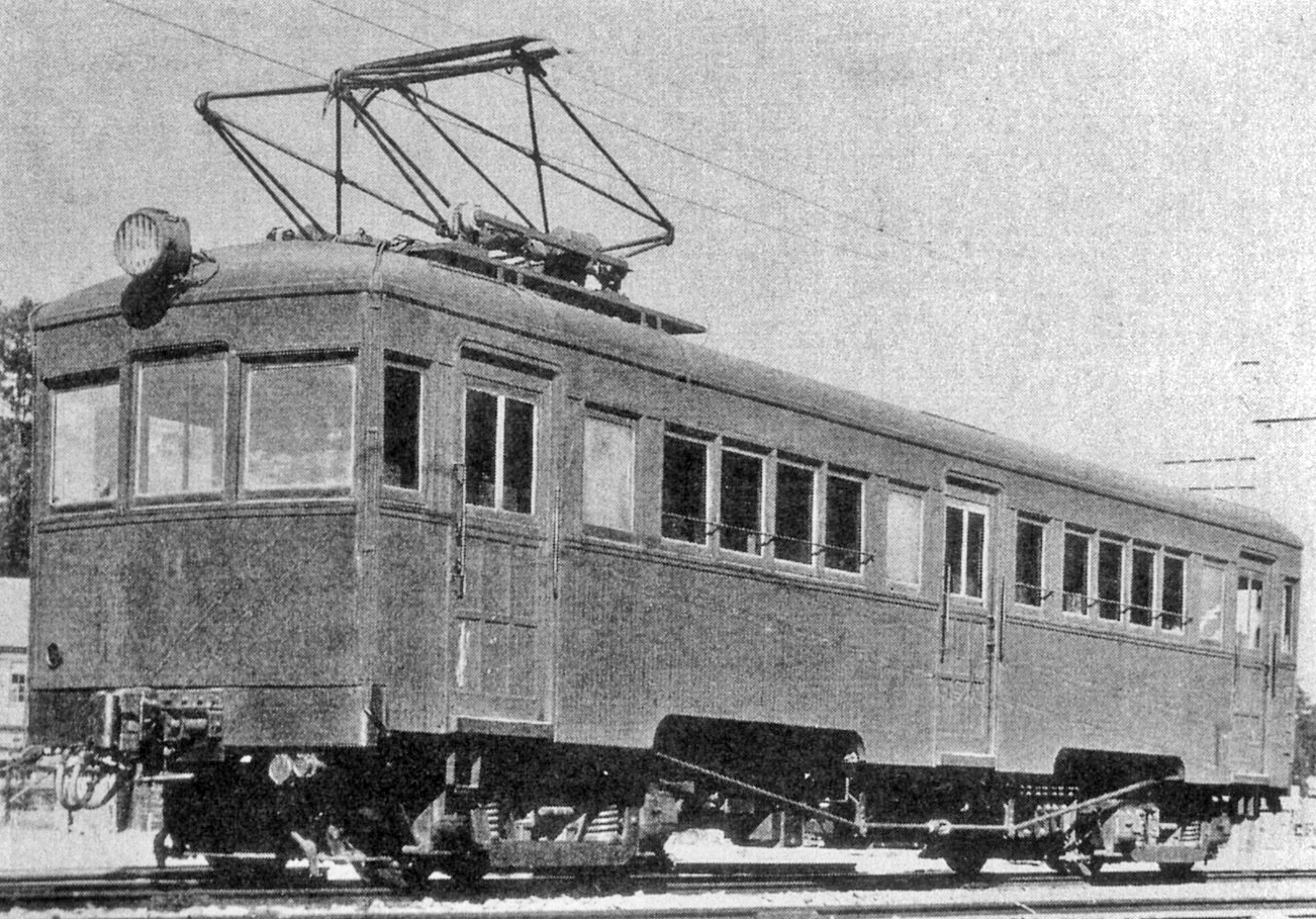 昭和3年に時速60キロの高速で走った光明電気鉄道の電車